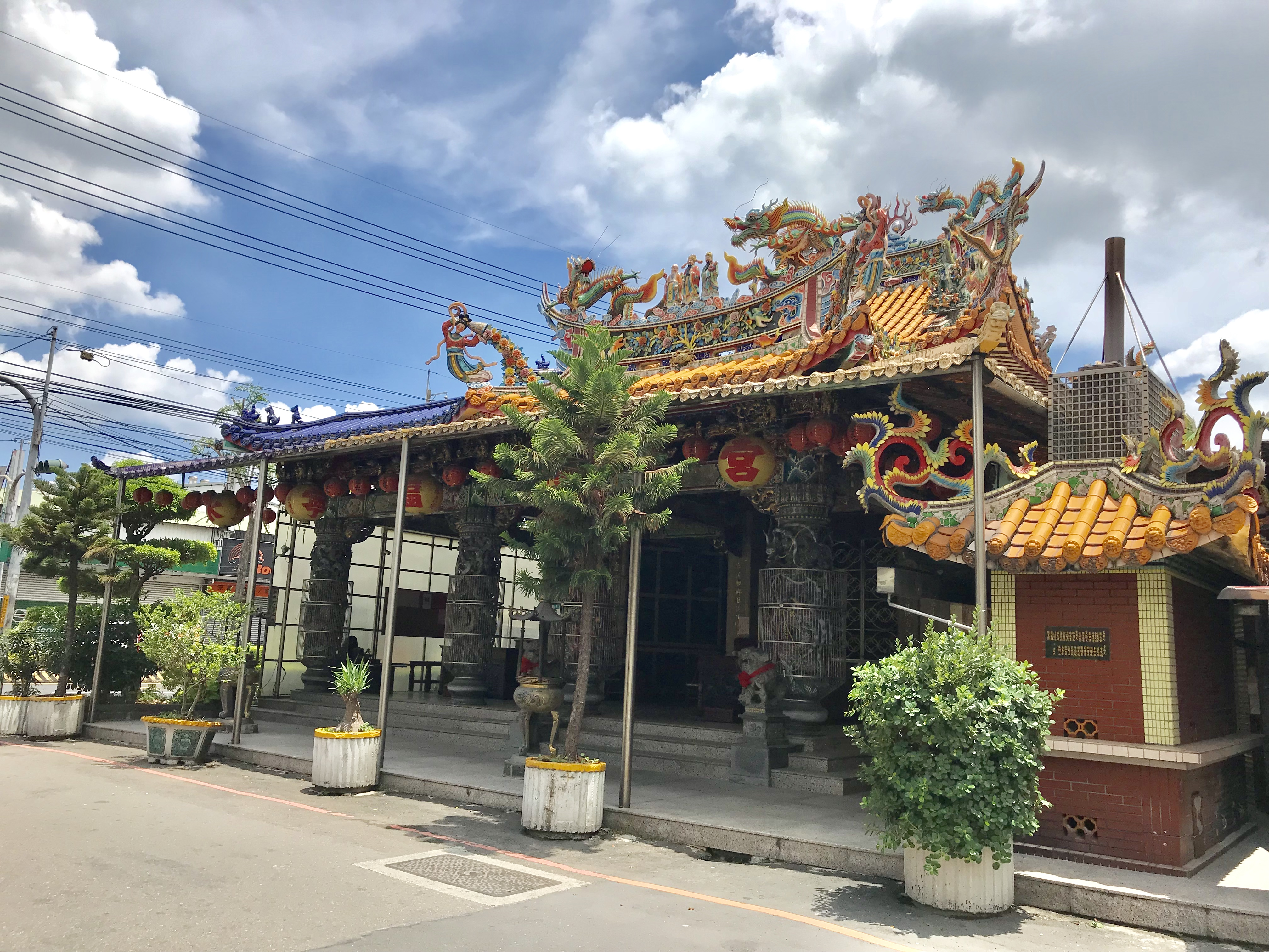 中文（台灣）: 永寧福德宮斜照